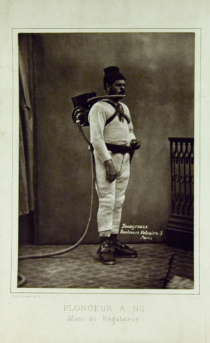 Plongeur à nu, muni du Régulateur (système Denayrouze), vers 1870. Lemercier, photographe Tirage d'époque en photoglyptie, monté sur support papier. Mention du titre et du photographe sous l'image sur le support de montage. Mention "Denayrouze Bd Voltaire 3 Paris" dans le tirage. 23 x 15 cm avec le montage.